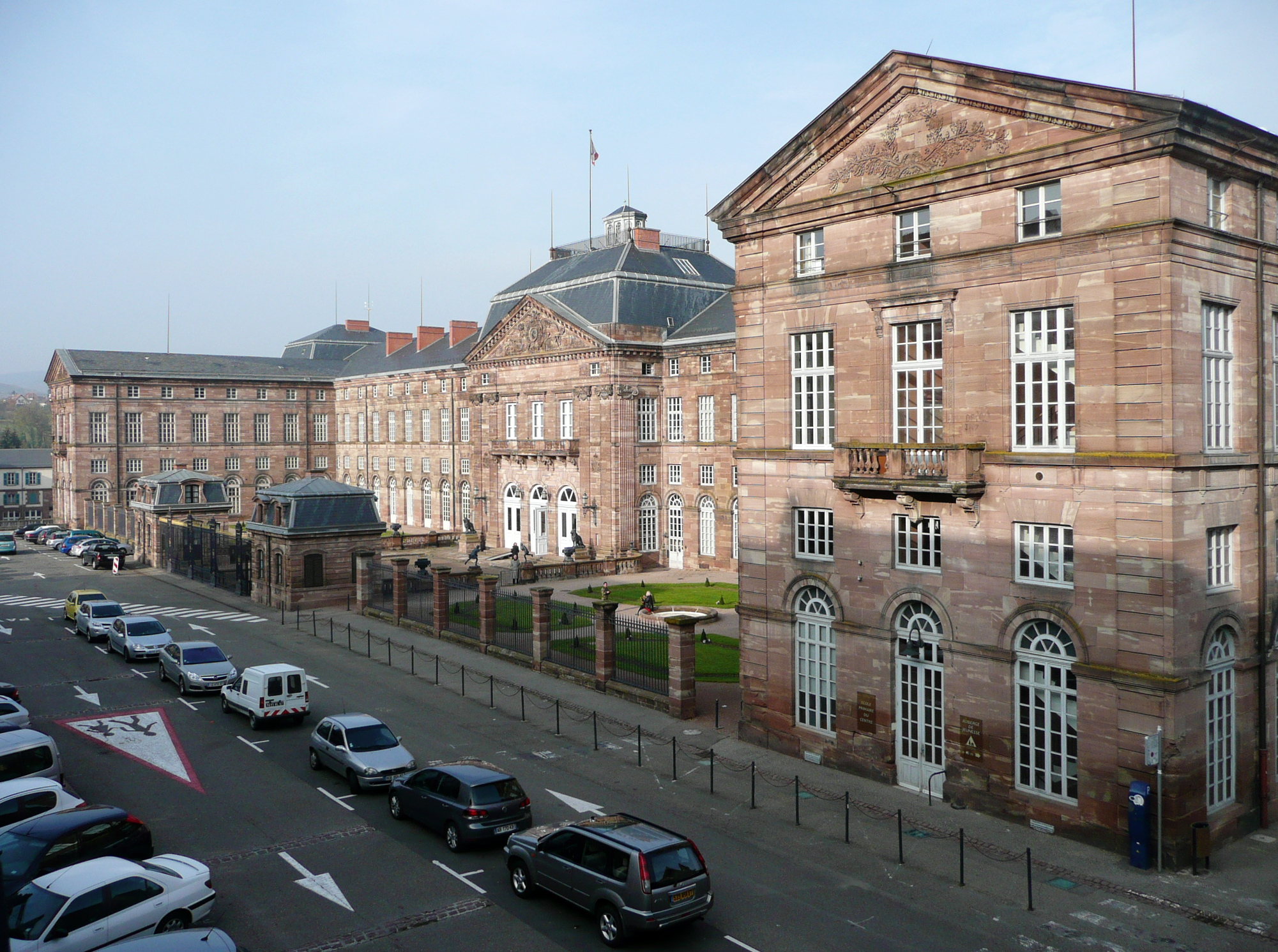 Saverne, Château des Rohan